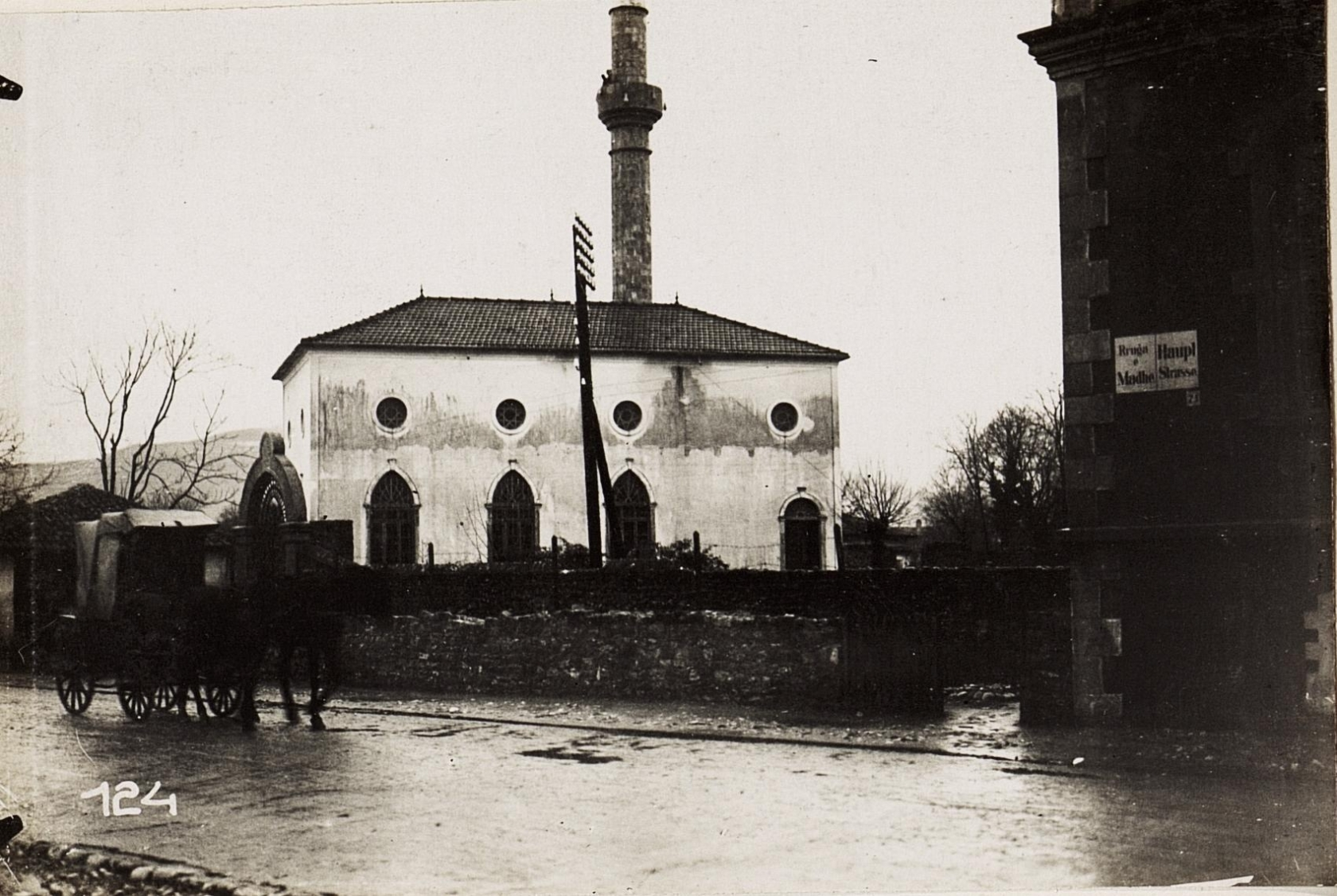 Moschee vor dem Festungskommando.